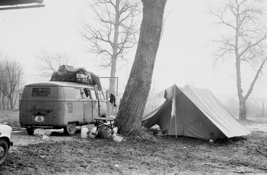 Prvi kampisti v Ljubljani.